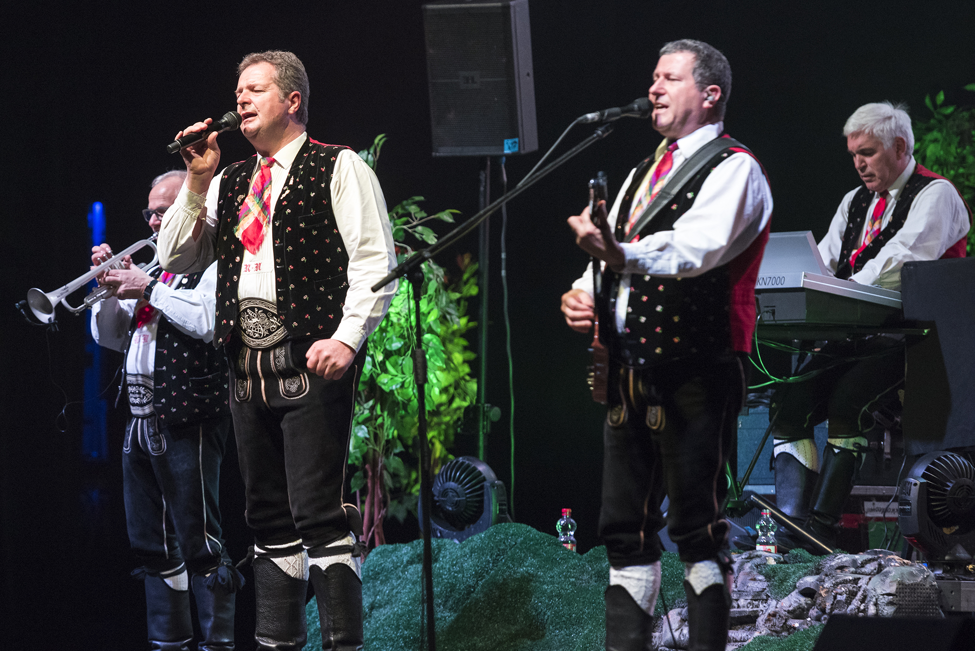 Kastelruther Spatzen in der Jahrhunderthalle Frankfurt.